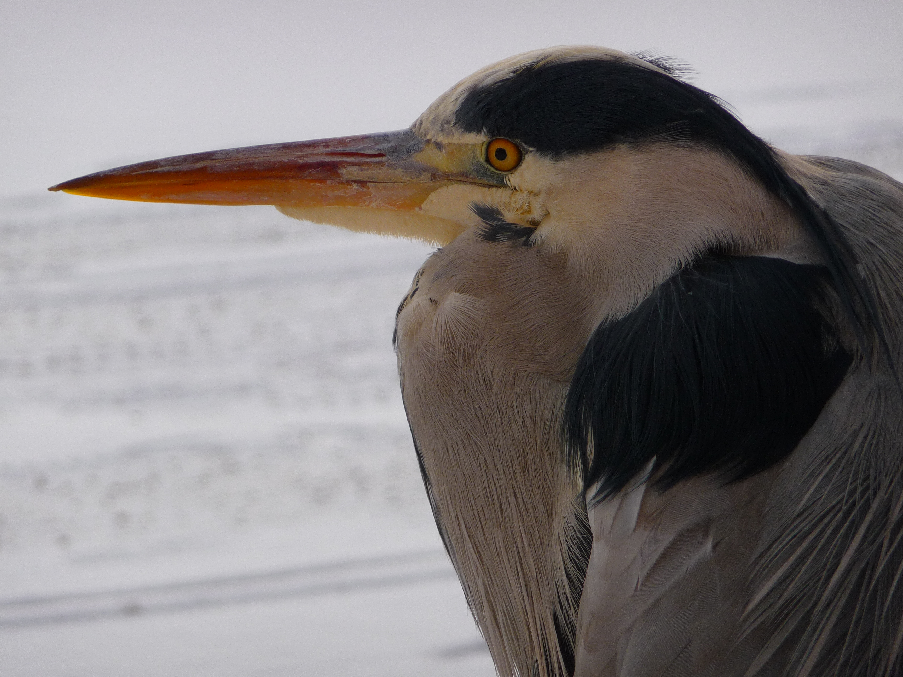 Graureiher (Ardea cinerea), fotografiert in Schwetzingen (Baden-Württemberg, Deutschland)